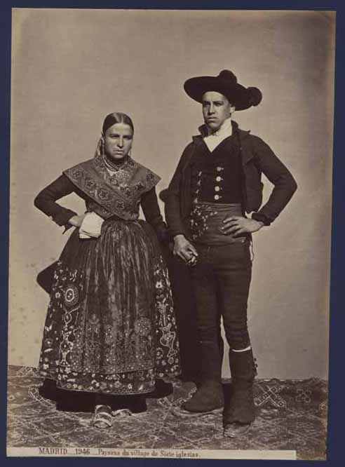 Paysans du village de Siete iglesias.